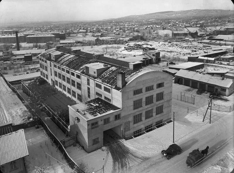 Romo fabrikker AS, Sandakerveien 102, Oslo.